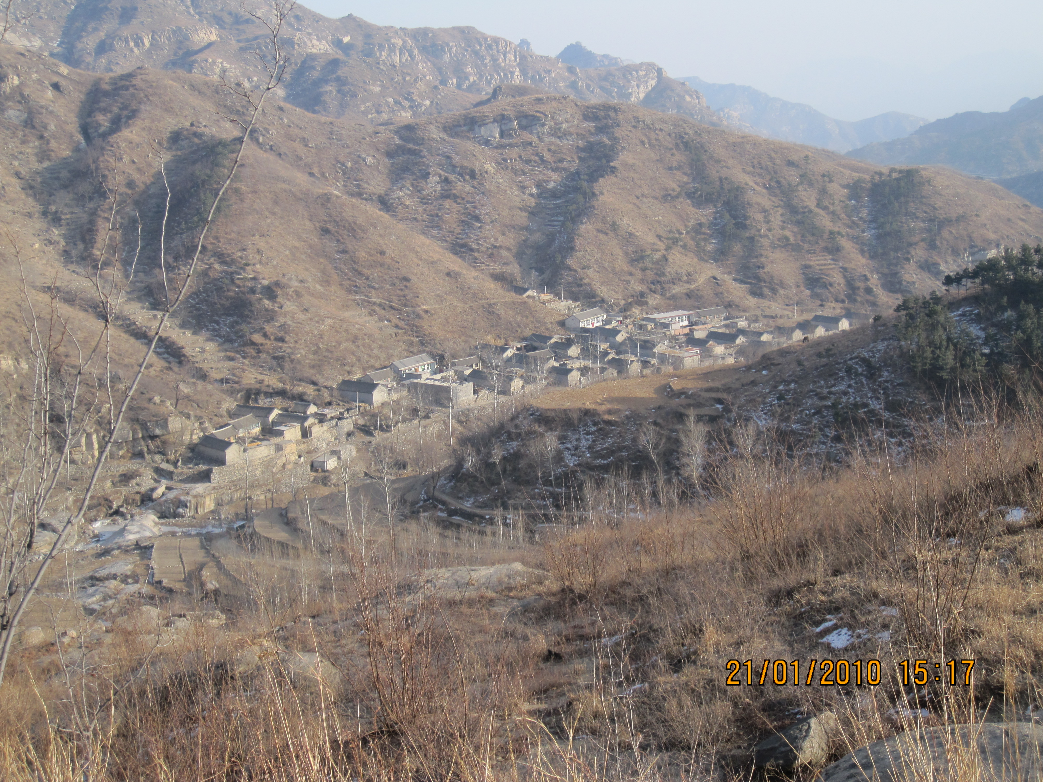 家乡组照之4